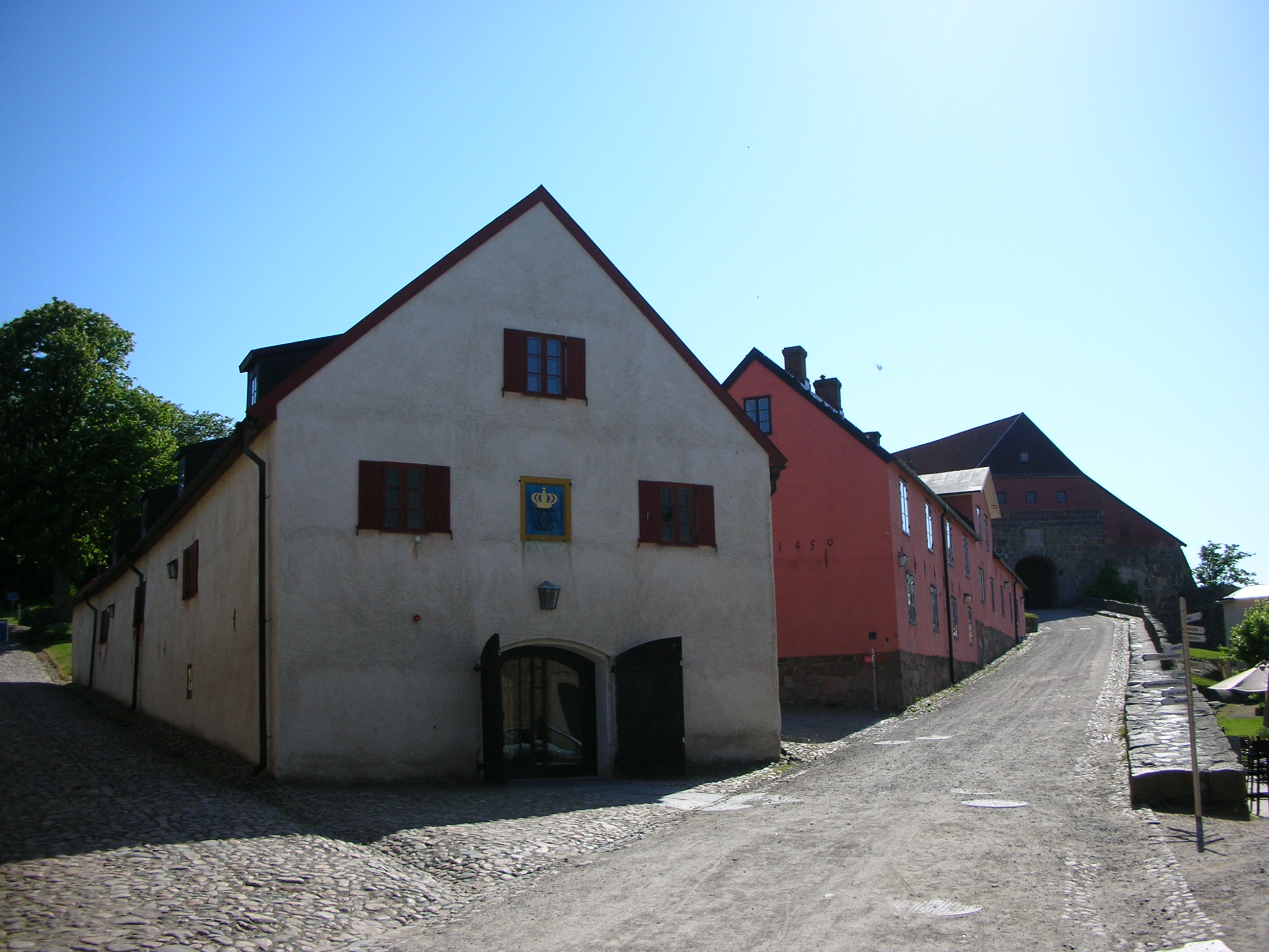 Karl XI:s stall, Varbergs fästning